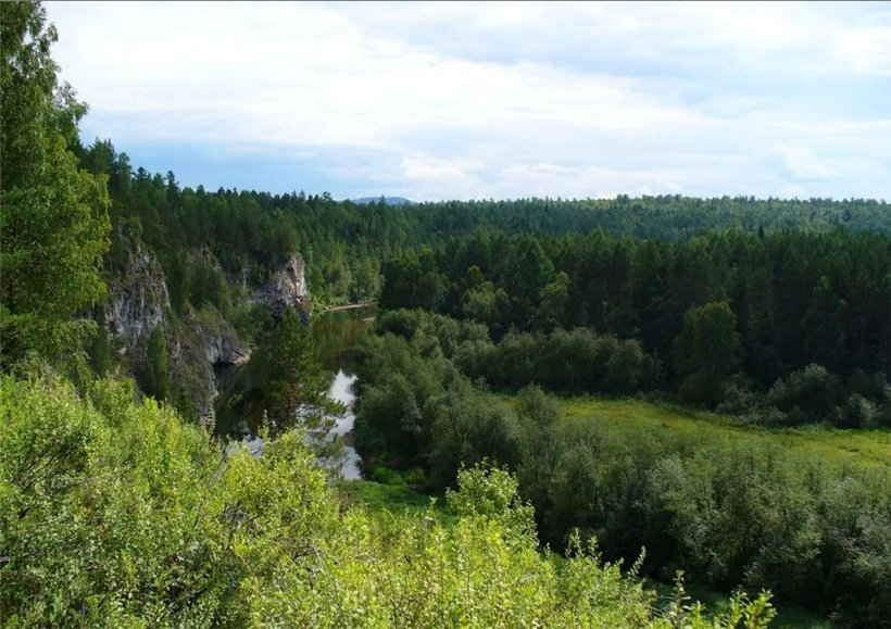 Бузулукский заповедник, Бузулукский район This image is related to the protected area of Russia number 5600017